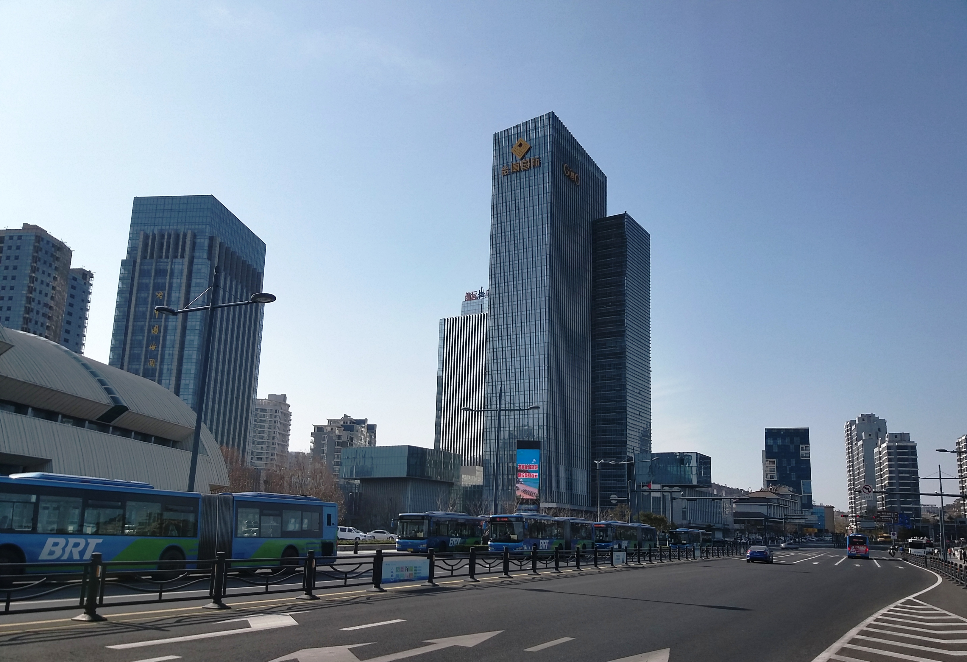 连云港金海国际周边